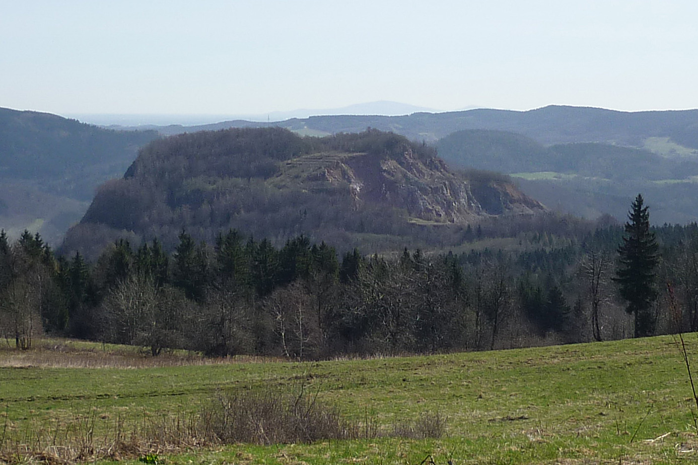 Góry Kaczawskie - widok z Owczarki na Połom z kamieniołomem